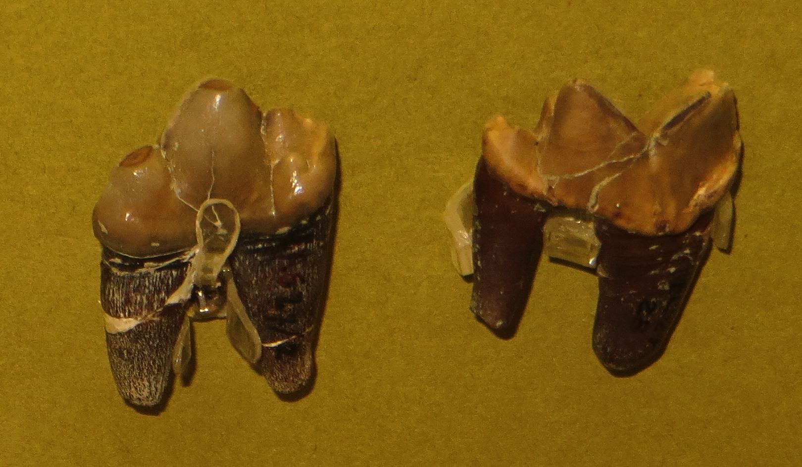 Fossil - took the picture at Museo Scienze Naturali di Faenza